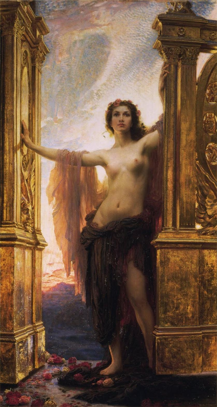 detail